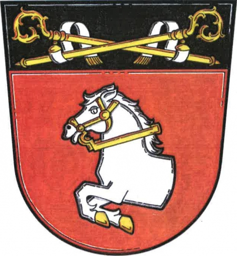 Bečice (CB), znak. V červeném štítě pod černou hlavou se zkříženými, závity dolů otočenými, zlatými berlami se stříbrnými sudarii polovina stříbrného koně se zlatými kopyty a uzděním.